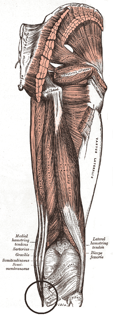 גיד רגל האווז.